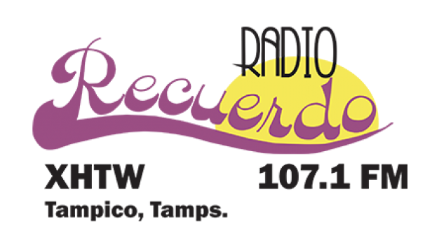 Logotipo de Radio Recuerdo 107.1